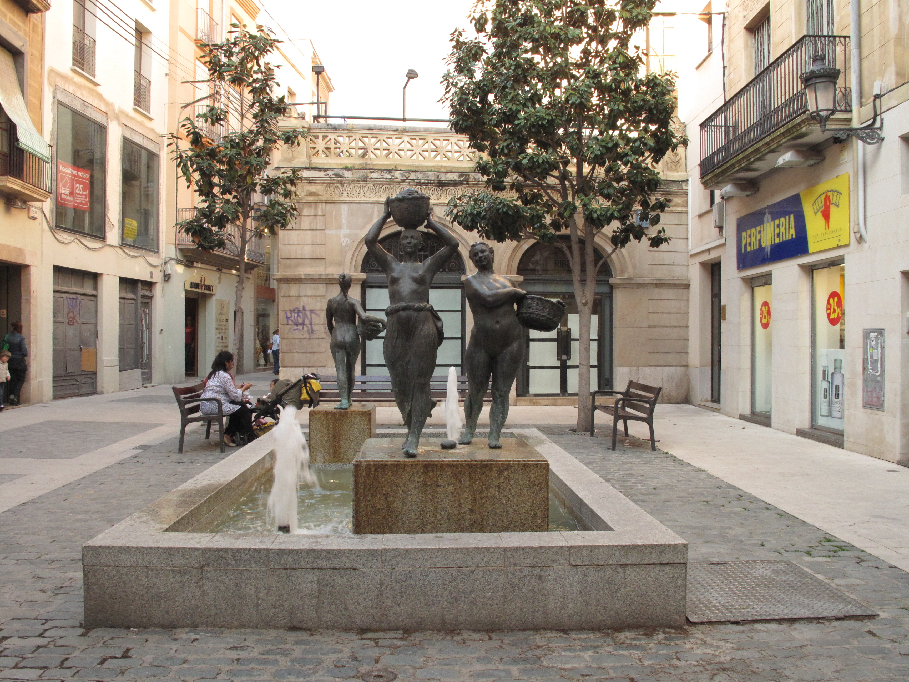 Magatzem a la plaça de les Basses, 5 (Reus)